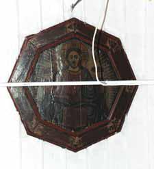 Исус Вседържител от църквата "Свети Петър и Павел" в Тушилово, Егейска Македония, Гърция.